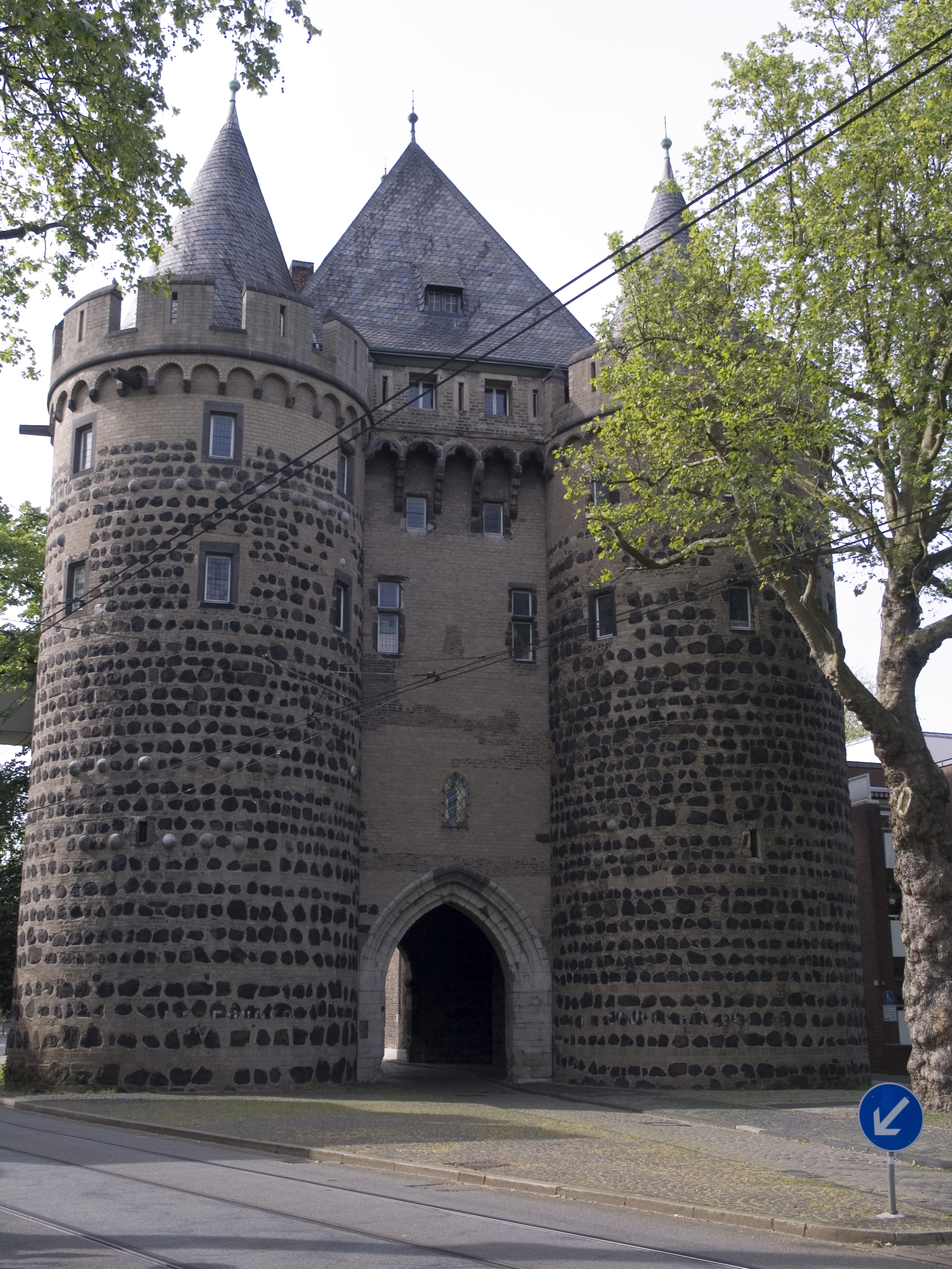 Северный Рейн-Вестфалия, Нойс – ворота Обертор